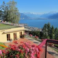 Centrul "Rabten Choeling" pentru Înalte Studii Tibetane din Elveţia